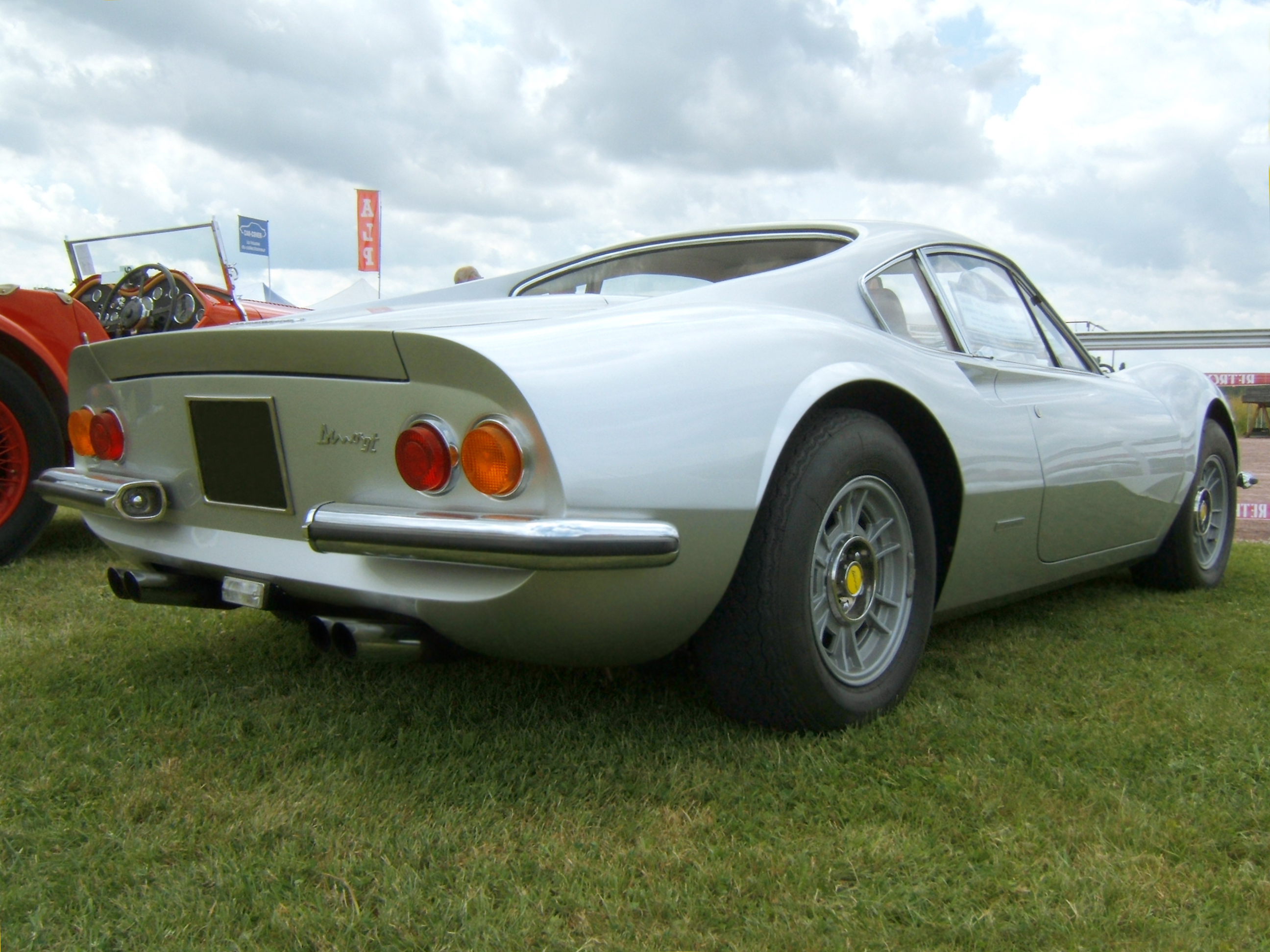 Ferrari Dino GT de 1972, dessinée par Aldo Brovarone.